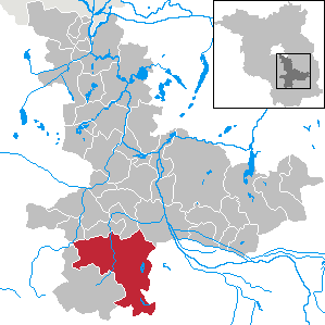 Luckau in Brandenburg (Country) - District Dahme-Spreewald